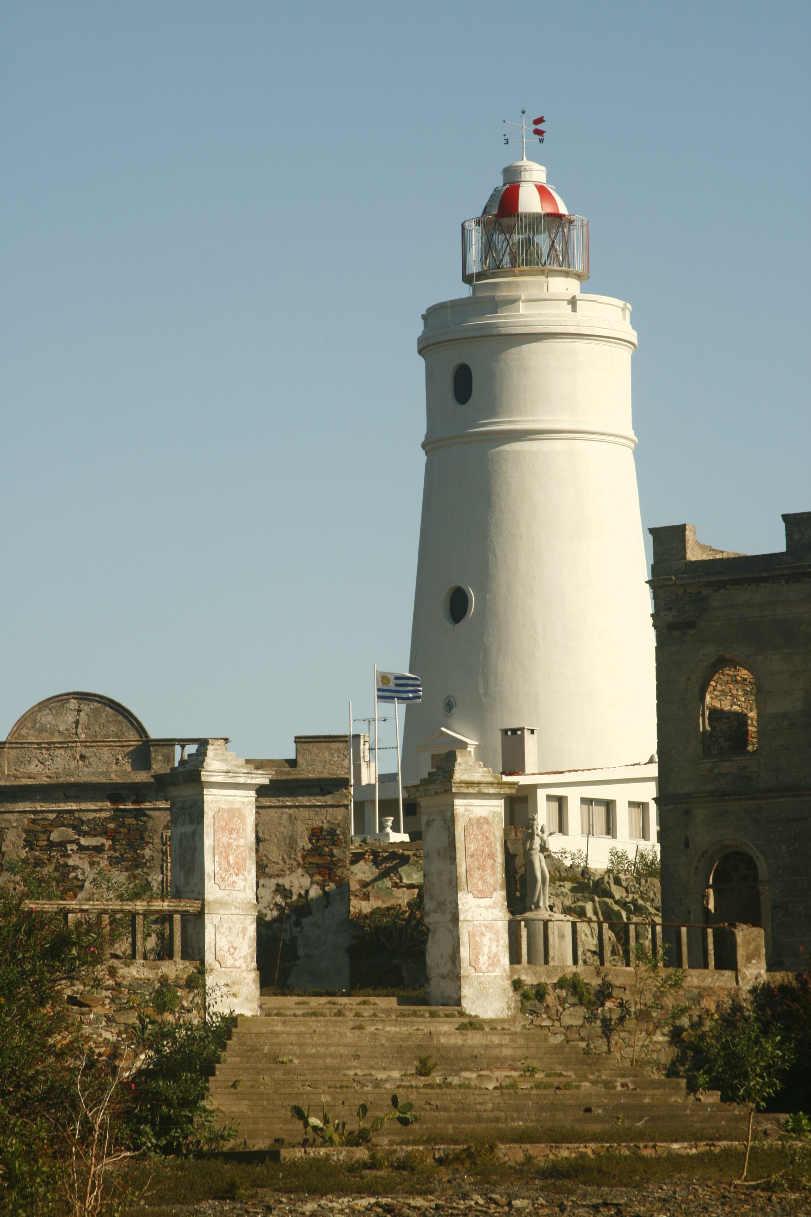 Faro de la Isla de Flores. Ubicado en el Río de la Plata, frente a la costa de Montevideo